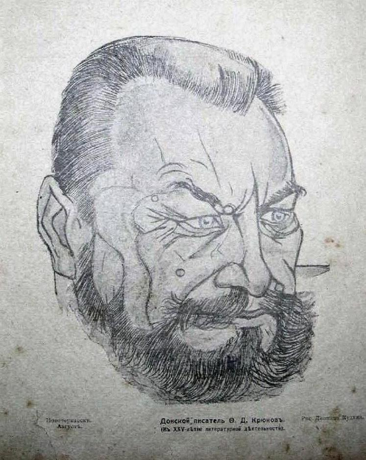 Портрет Фёдора Крюкова в журнале "Донская волна", 1918 г. Рисунок Леонида Кудина.